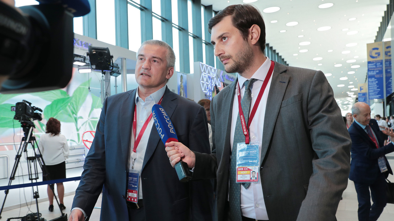 В ходе XXIII Петербургского международного экономического форума Глава Республики Крым Сергей Аксёнов подписал соглашение о реализации инвестиционного проекта по строительству завода по производству плит для домостроения «Атлант».